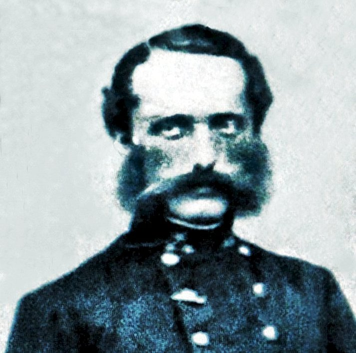 Rudolf Freiherr Lenk von Wolfsberg, FML 1885, *Mainz, 11.08.1834 + Wien, 25.03.1907, Sohn des FZM Wilhelm LvW